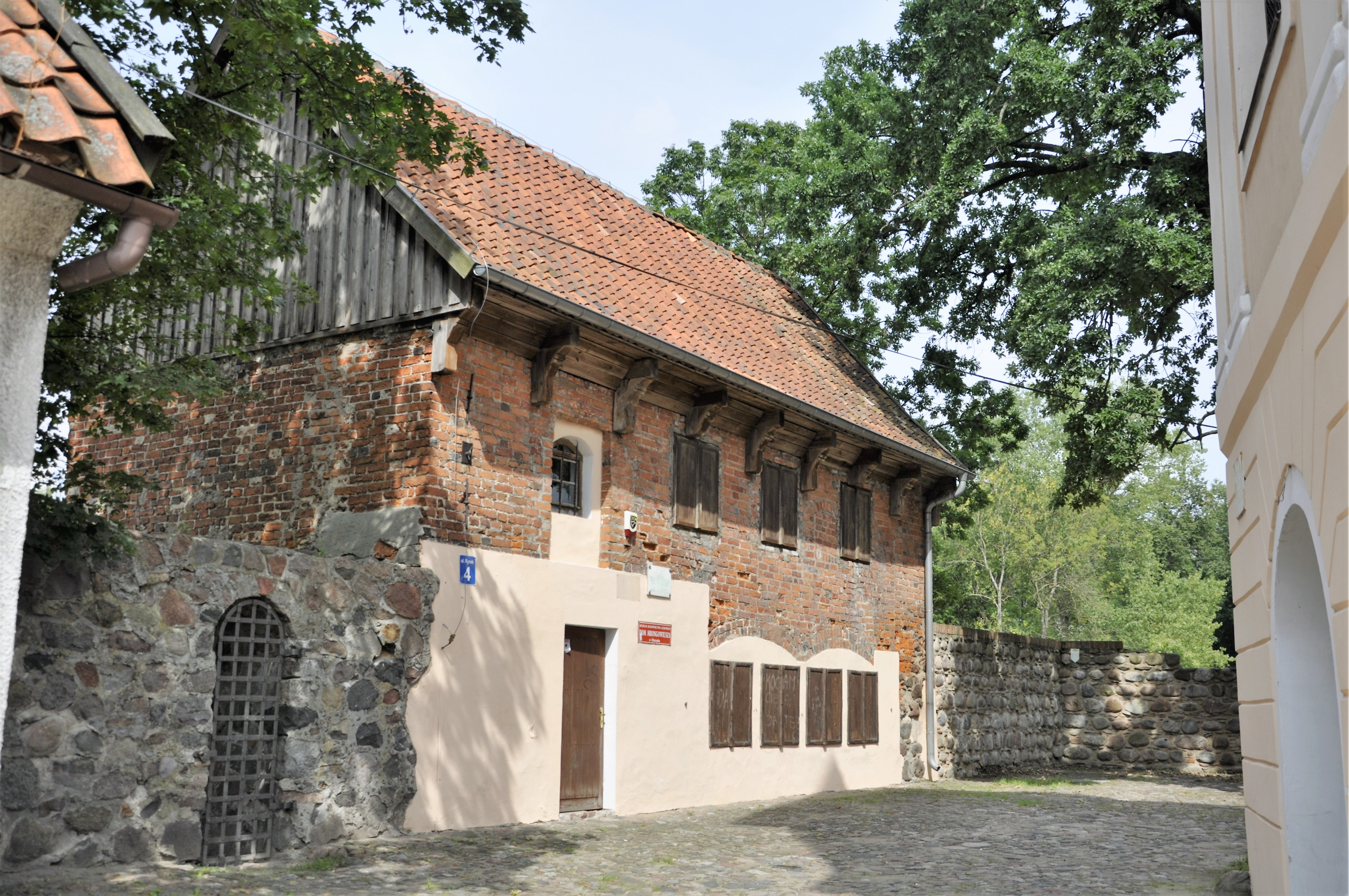 Olsztynek, dawna plebania ewangelicka - Dom Mrongowiusza, ob. muzeum, 1648, XIX